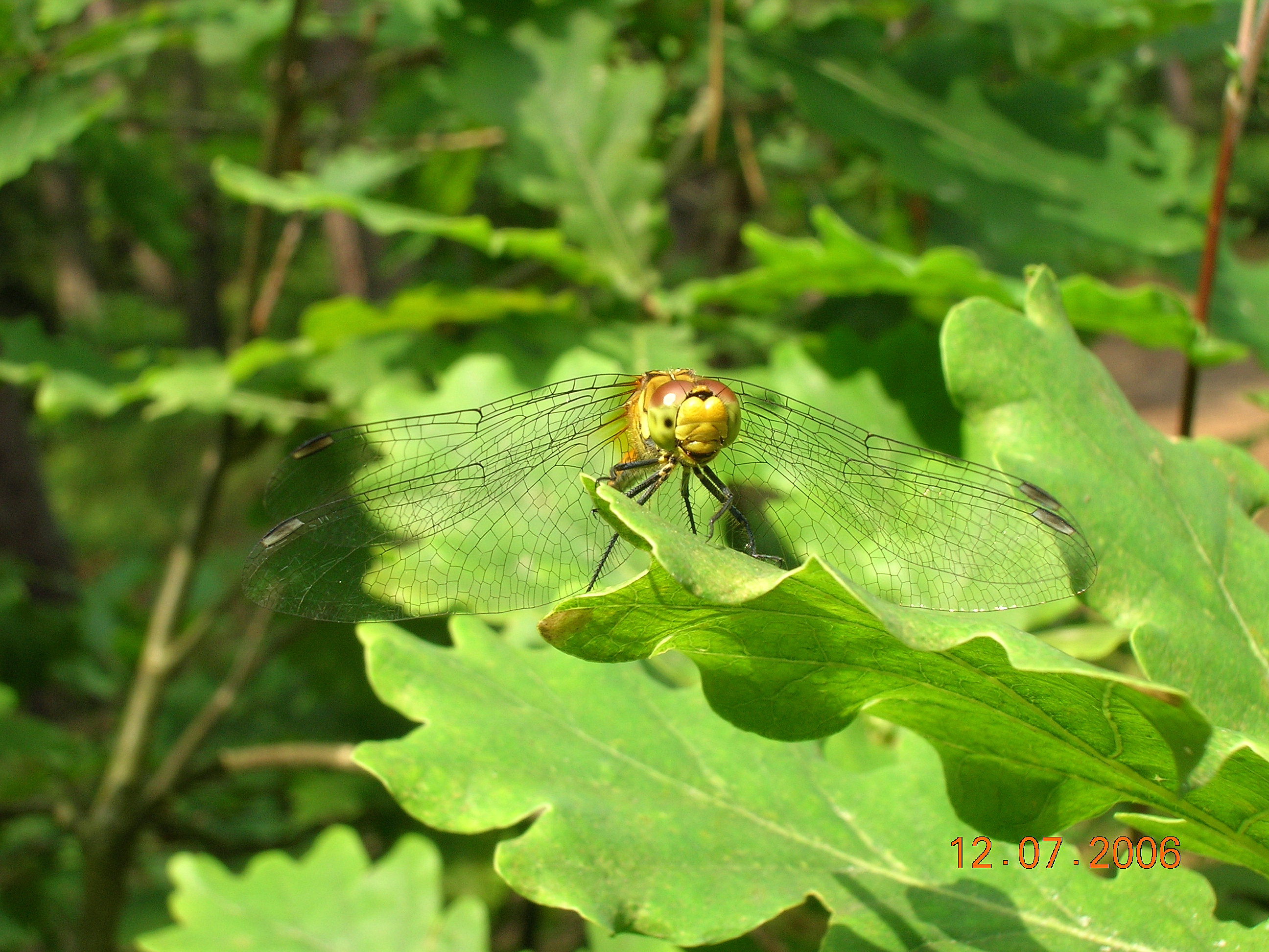 szablak przypłaszczony (Sympetrum depressiusculum), Słowiński Park Narodowy